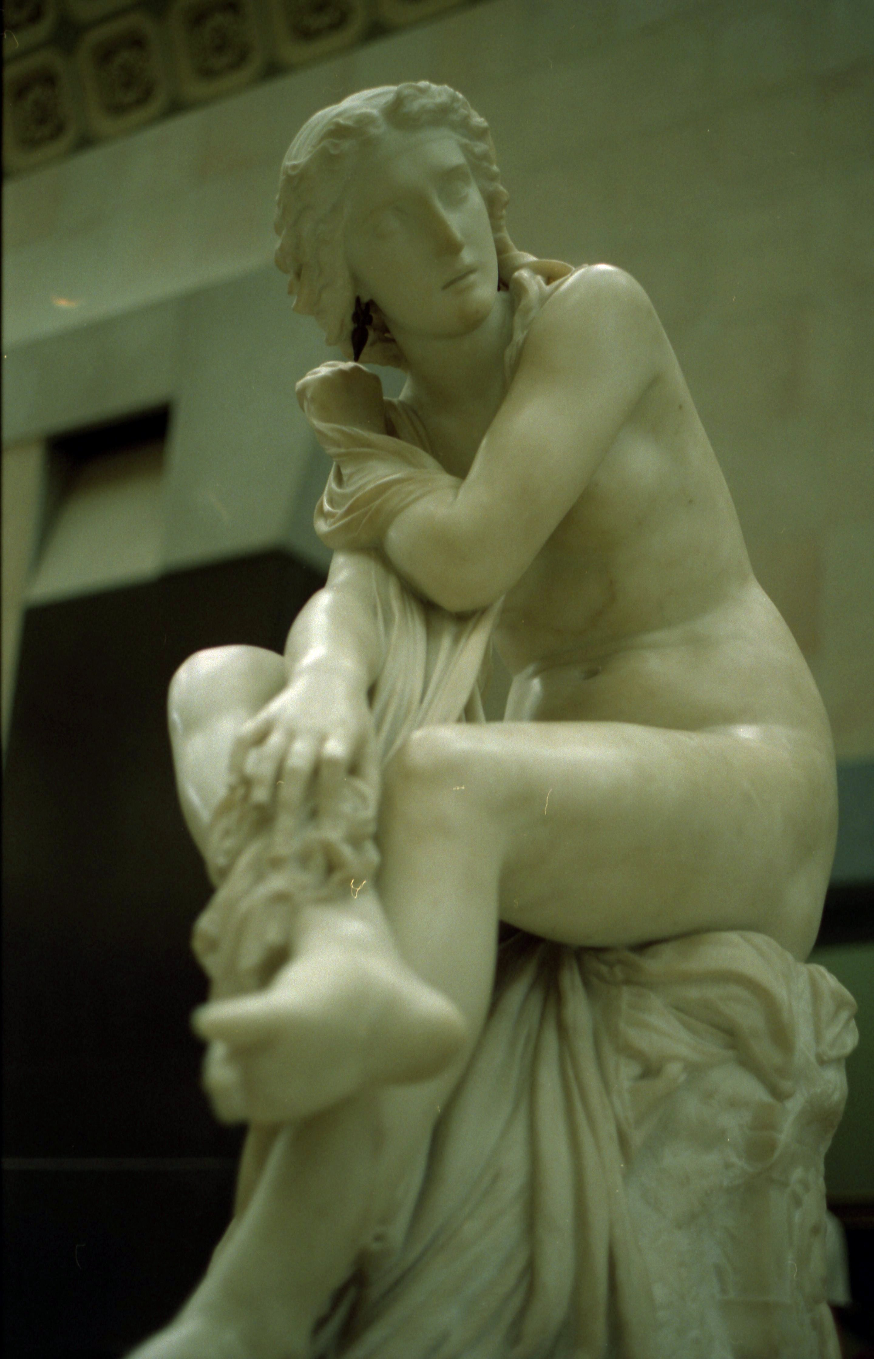 Paul Cabet (Français, 1815-1876) : Suzanne surprise au bain ou La Sortie de bain, 1861, marbre, Musée d'Orsay, Paris, France.